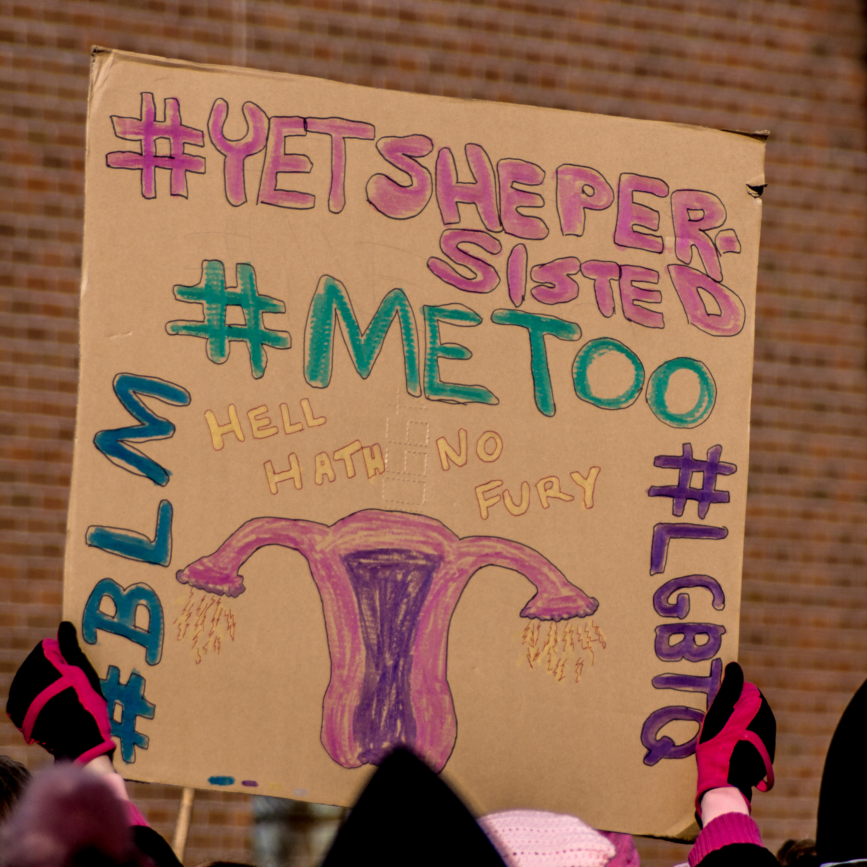 BLM #METOO #YETSHEPERSISTED #LGBTQ #WomensMarch #WomensMarch2018 #SenecaFalls #NY